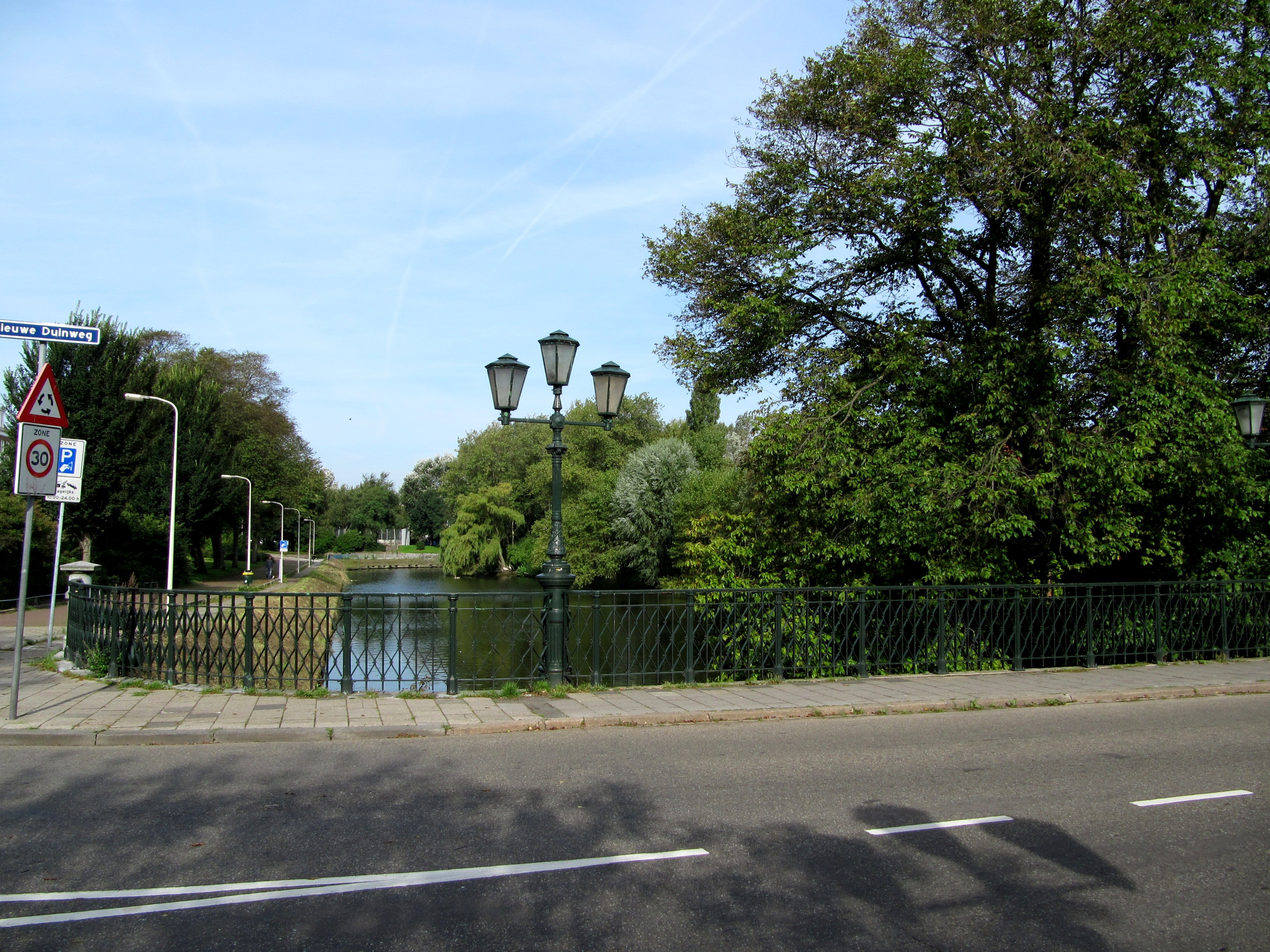 RM477414 Den Haag - Nieuwe Duinwegbrug (2).jpg